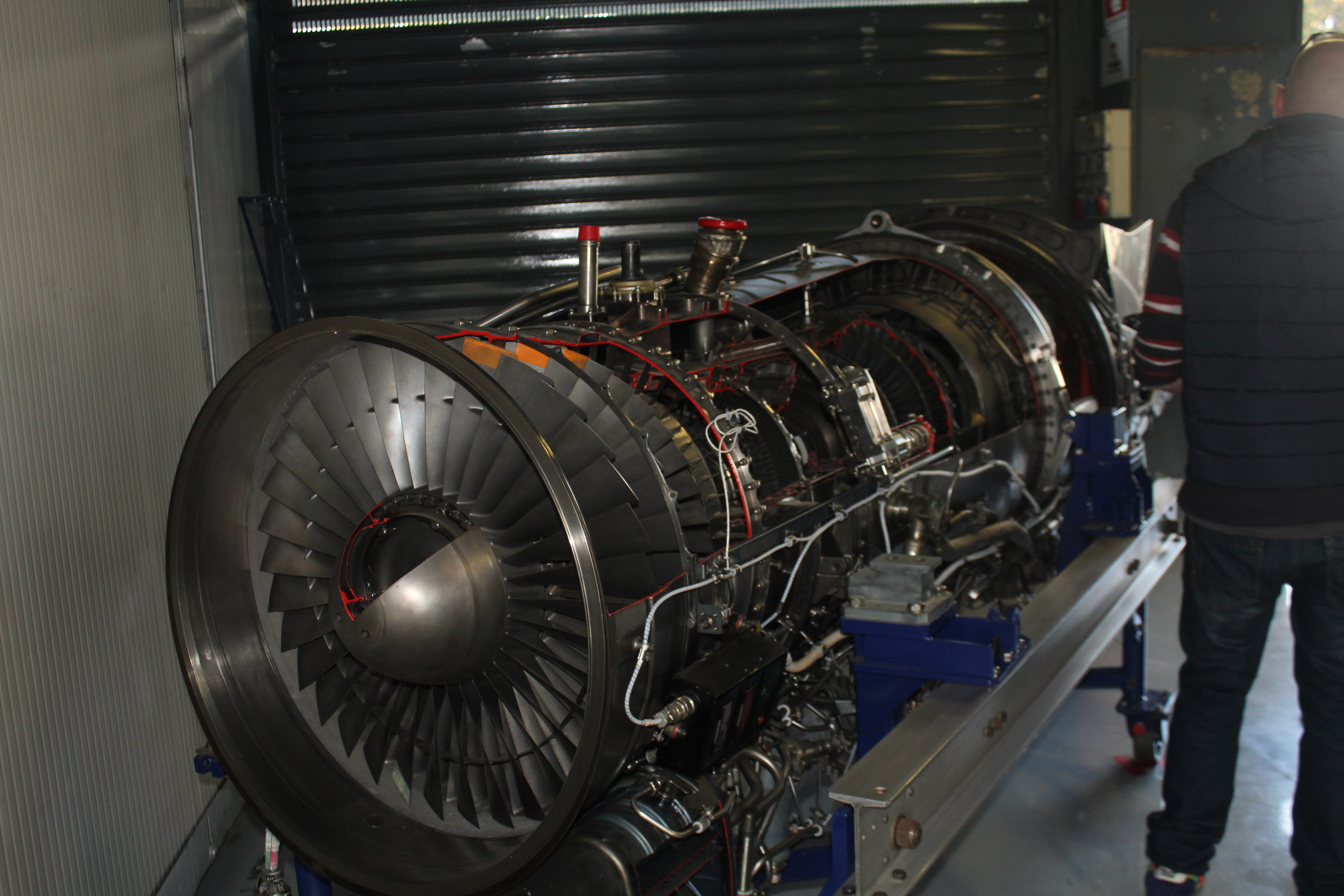 Versione modificata nell'inserimento di forature sulla superficie delle palette per evitarne il blocco nelle tempeste di sabbia